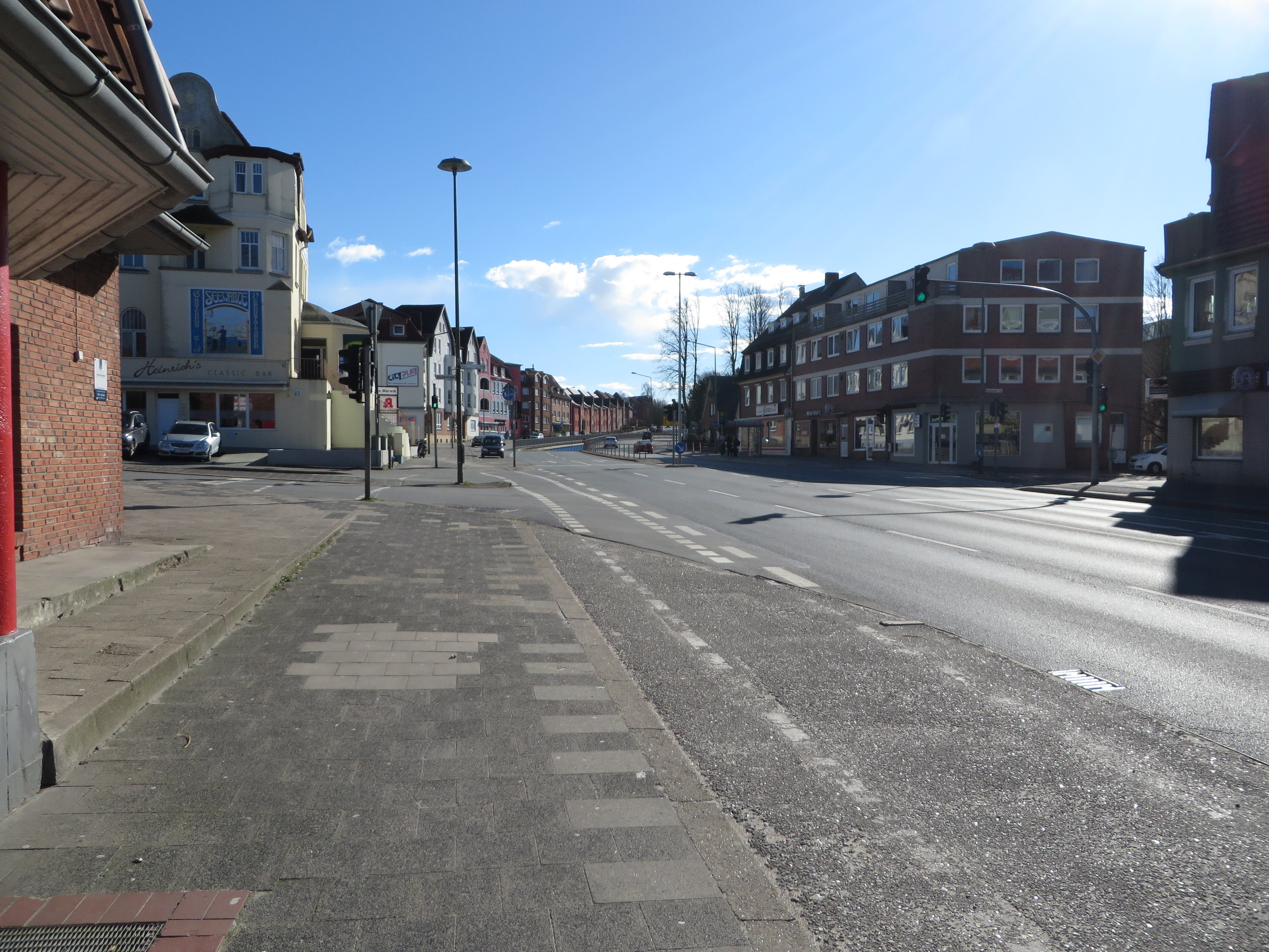 Alt-Mürwiker Zentrum bei der Seewarte (Flensburg April 2015)